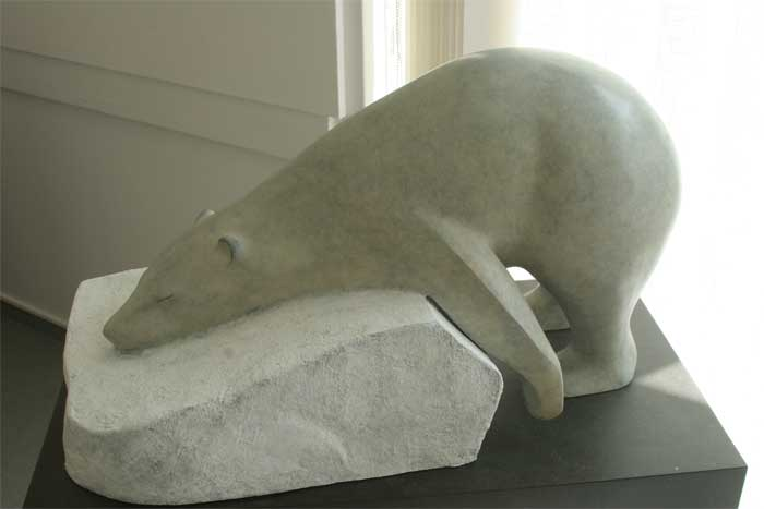 Ijsbeer in brons gegoten via verloren wastechniek: Mark Dedrie, Stempel gieterij: Art casting Belgium